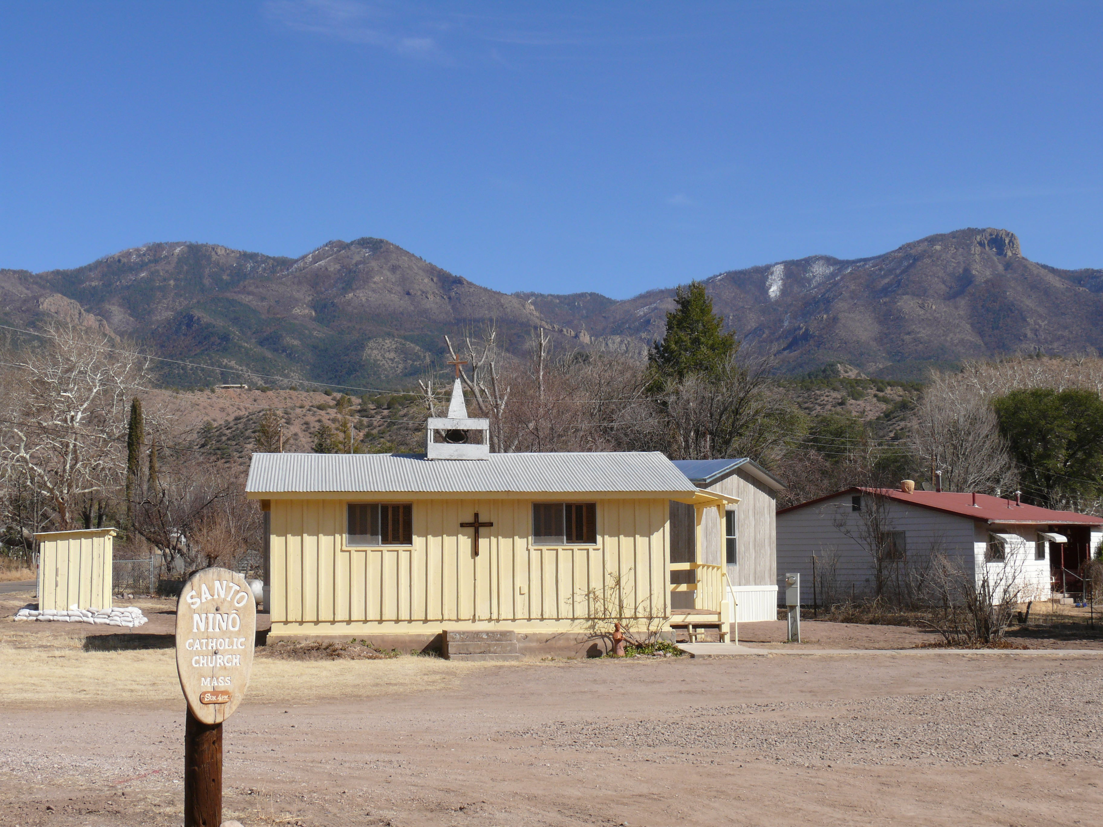 L'église Santo Niño à Glenwood (Nouveau-Mexique, États-Unis).